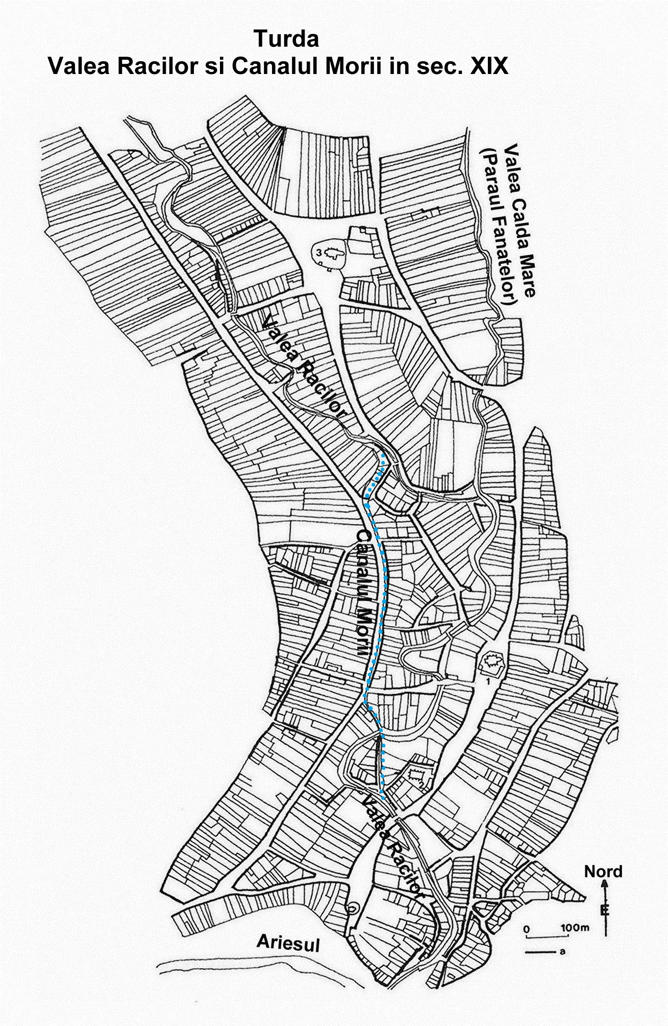 Turda - Valea Racilor şi Canalul Morii în secolul al XIX-lea până la mijlocul secolului al XX-lea.